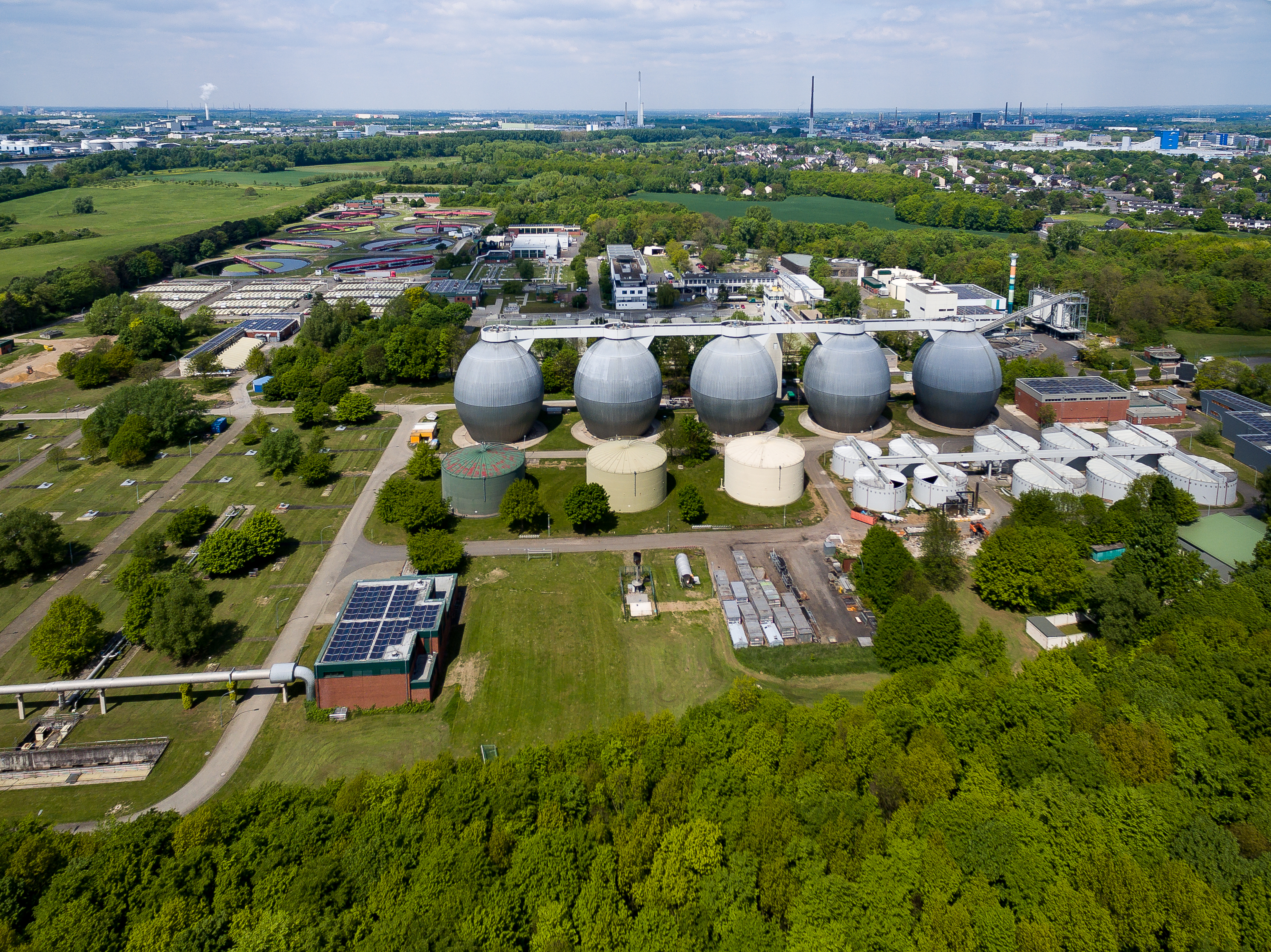 Großklärwerk Stammheim